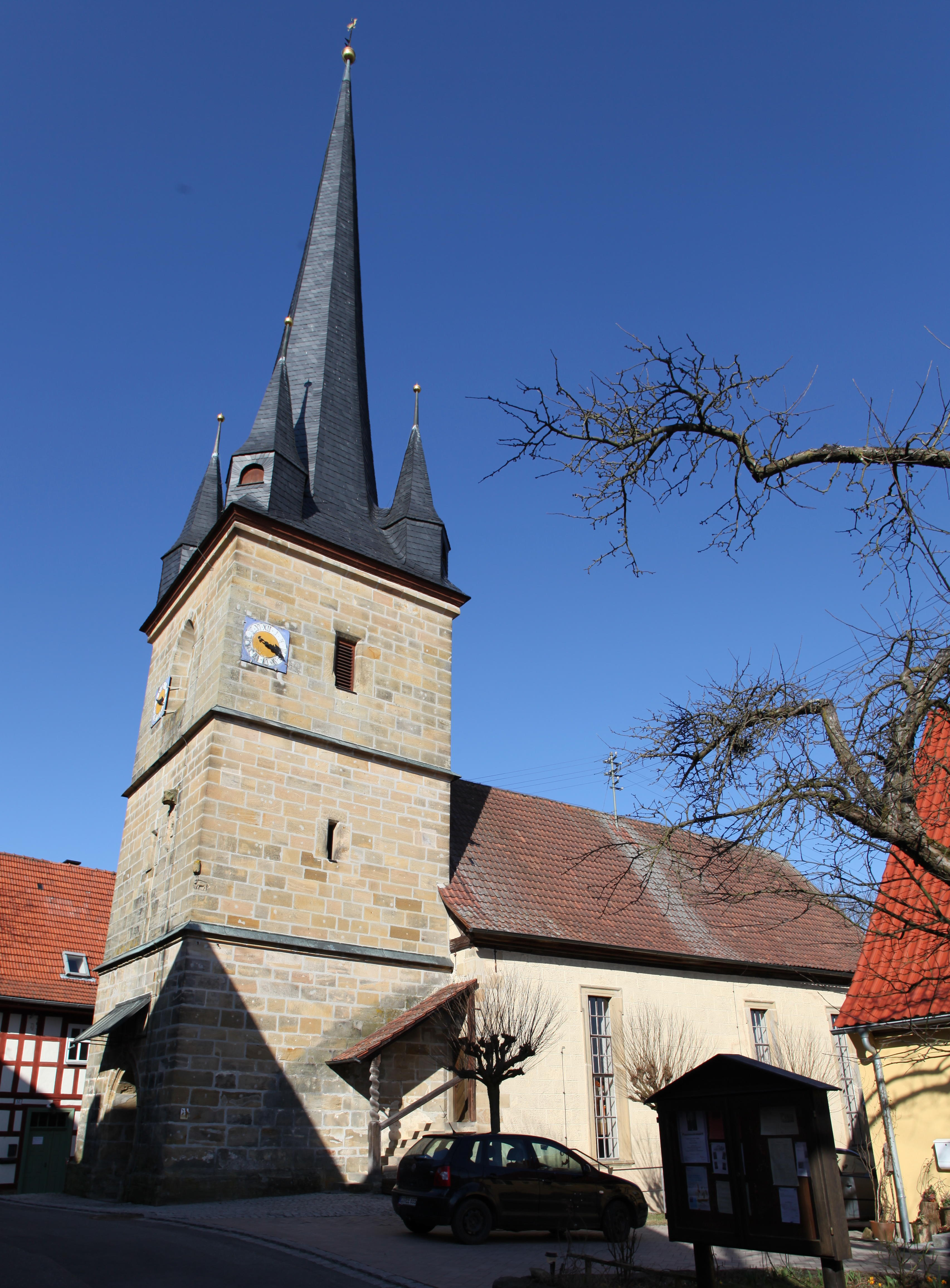 Evangelische Kirche in Schottenstein, Landkreis Coburg